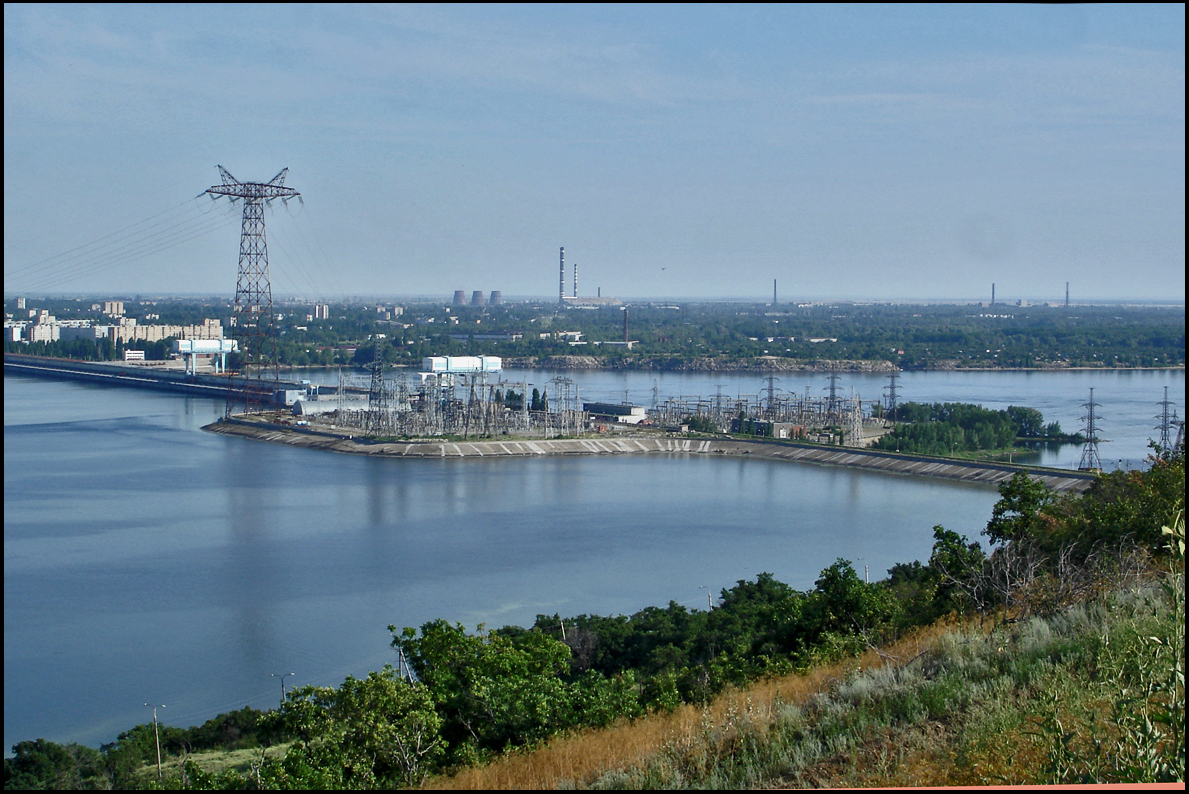 Балаковская ГЭС